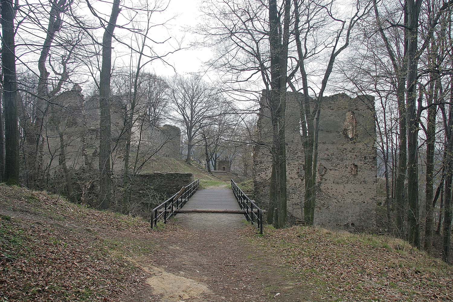 Vstup na hrad Vikštejn v okrese Opava